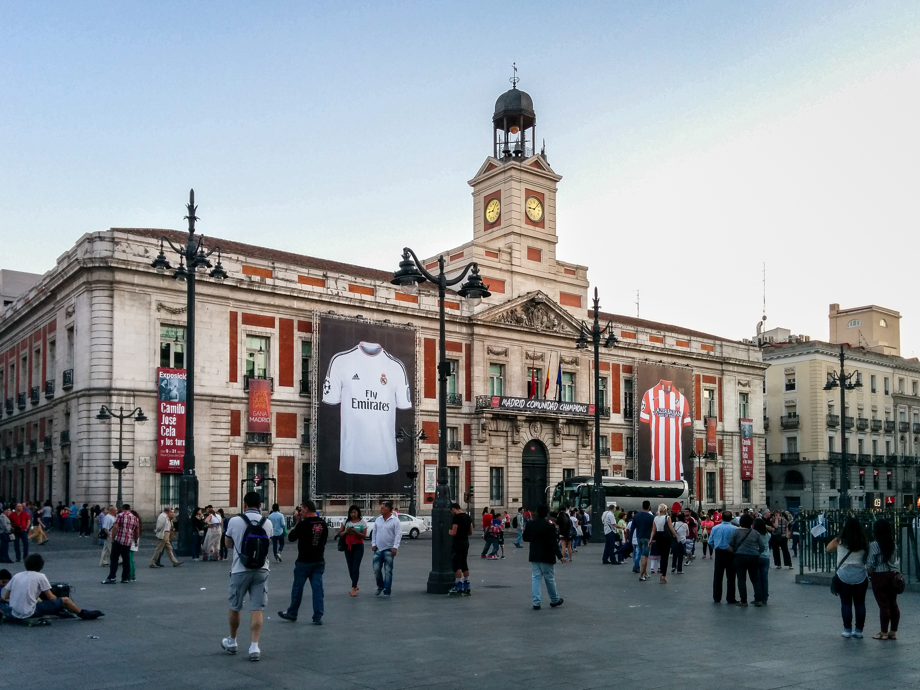 La Casa de Correos de Madrid, en la Puerta del Sol, con las camisetas de los dos equipos finalistas de la UEFA Champions League 2014: Real Madrid y Atlético de Madrid.